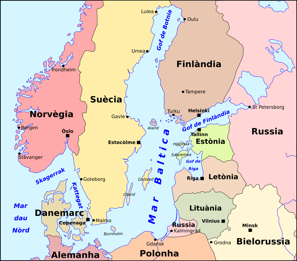 Carta politica de la Mar Baltica.